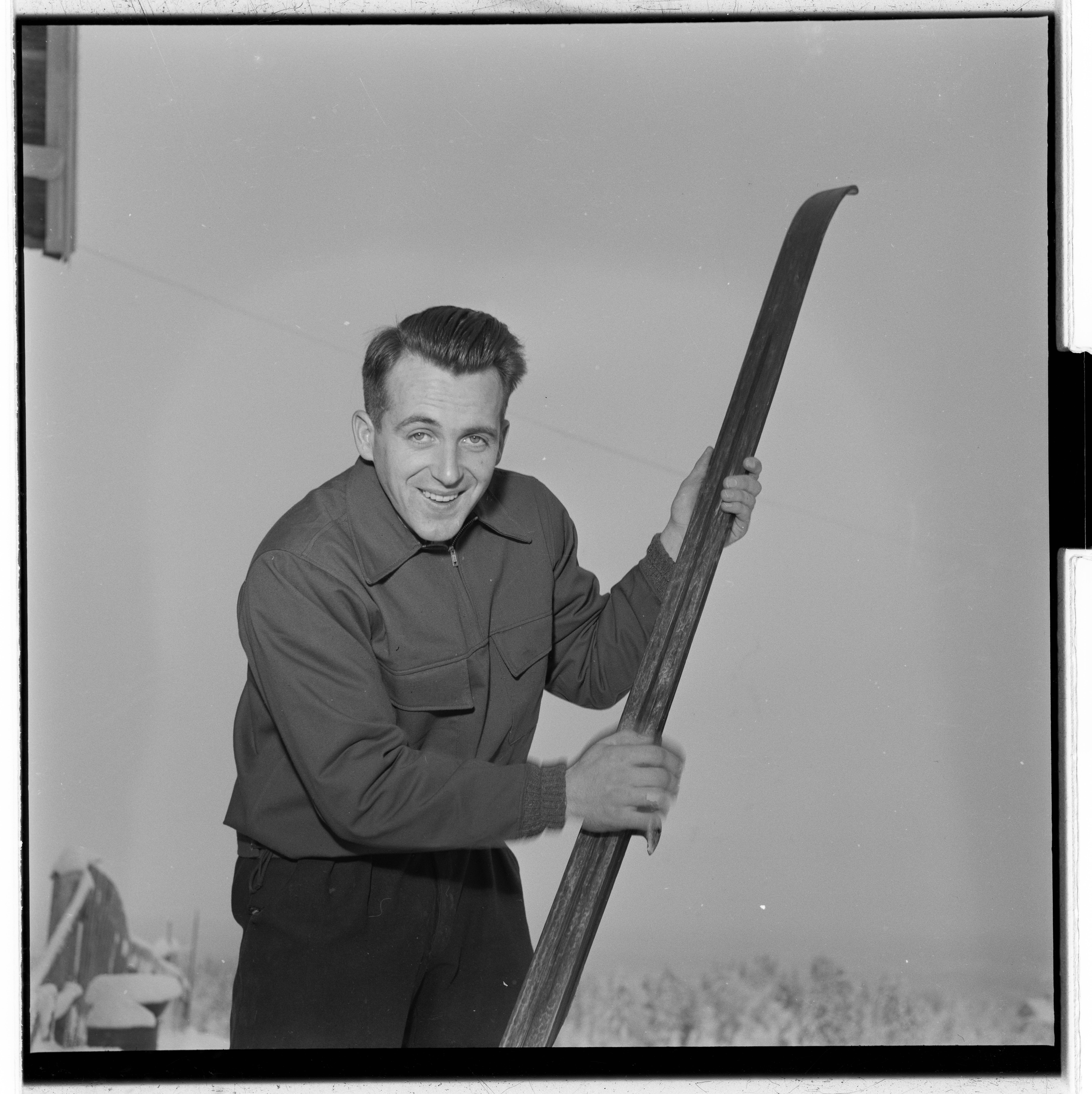 Bildet er hentet fra Arkivverket. Portrett av Hallgeir Brenden. Foto tatt i forbindelse med reportasje i Billedbladet Nå om Hallgeir Brenden med familie hjemme på gården i Trysil. Arkivinstitusjon : Arkivnavn : Billedbladet NÅ Sted : Norge, Hedmark, Trysil, Tørberget Emneord: Portretter, Langrennsløpere, Idrettsutøvere, Skismøring, Ski, Vinter Avbildet